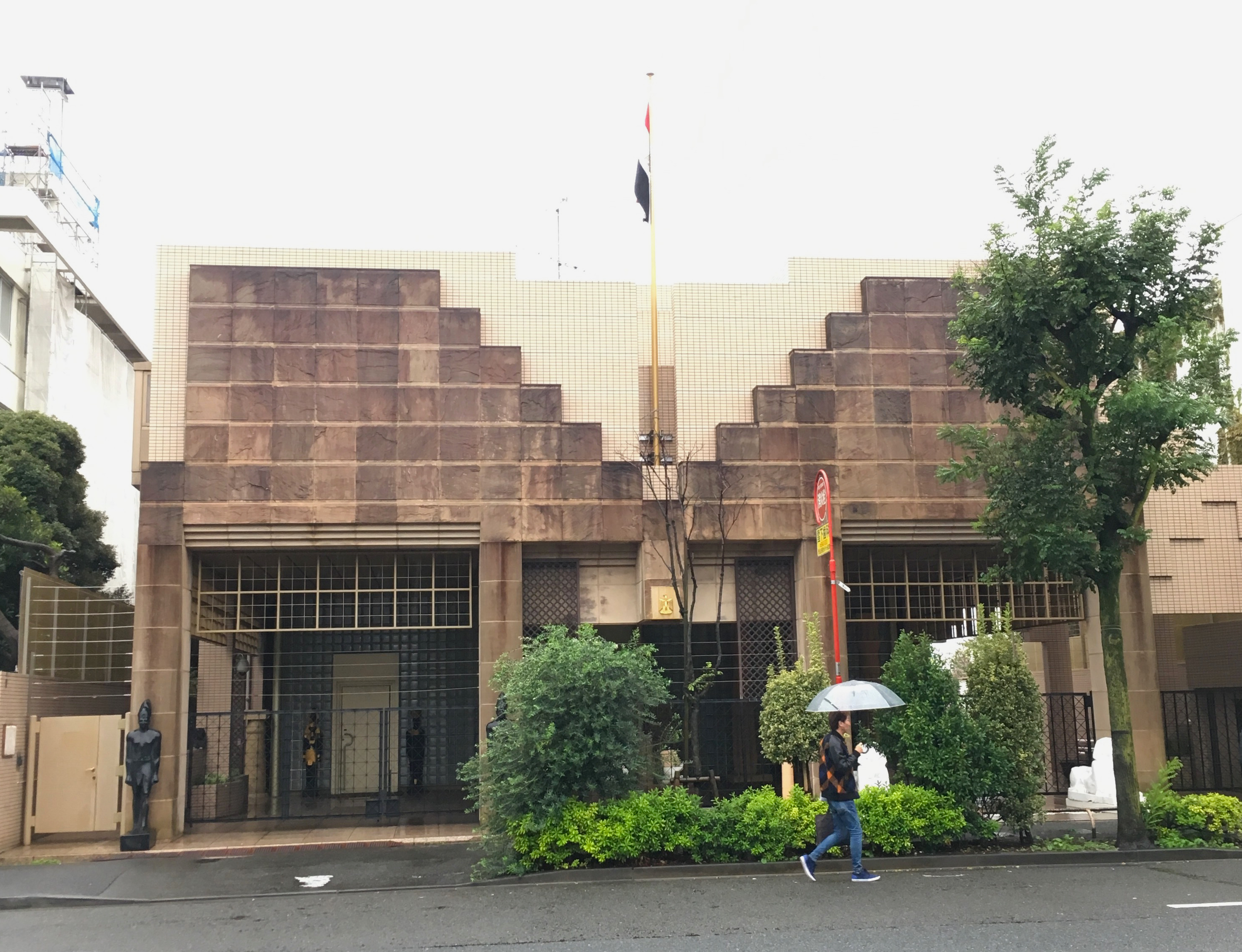 竹山実の建築作品